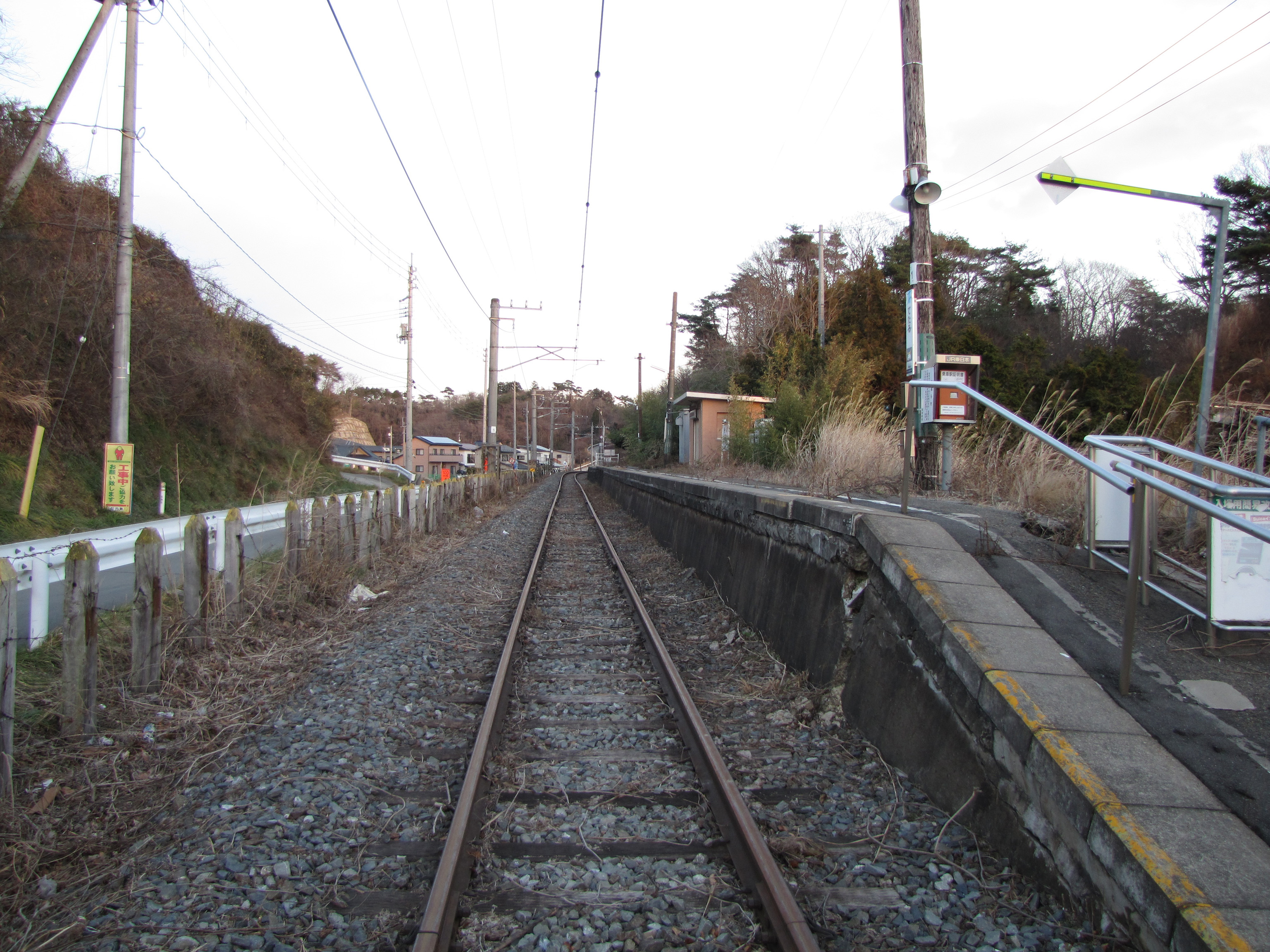 JR仙石線 手樽駅（休止中の駅構内）